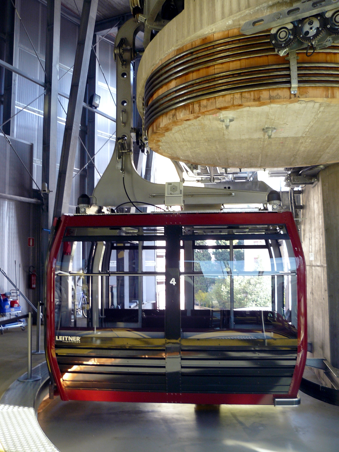 Kabine der neuen Rittner Seilbahn, Bozen, Südtirol